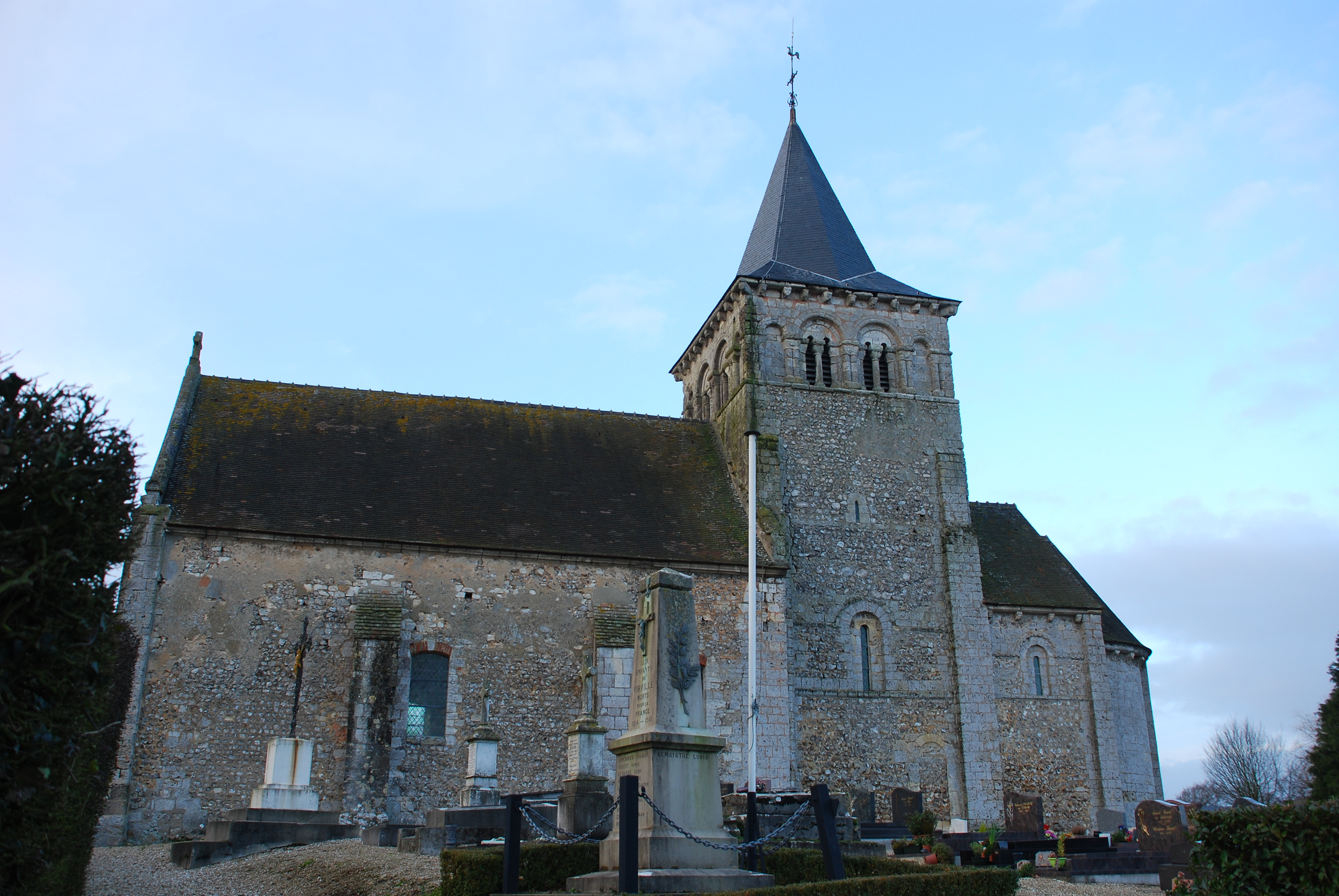 Église Saint-Aubin de Virville, (Classé, 1913) .